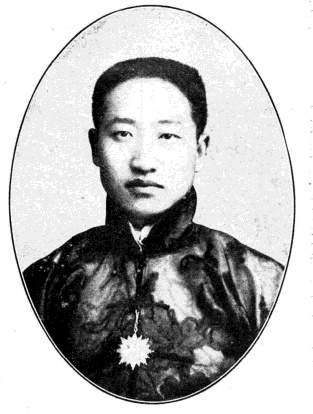 中華民國國會議員